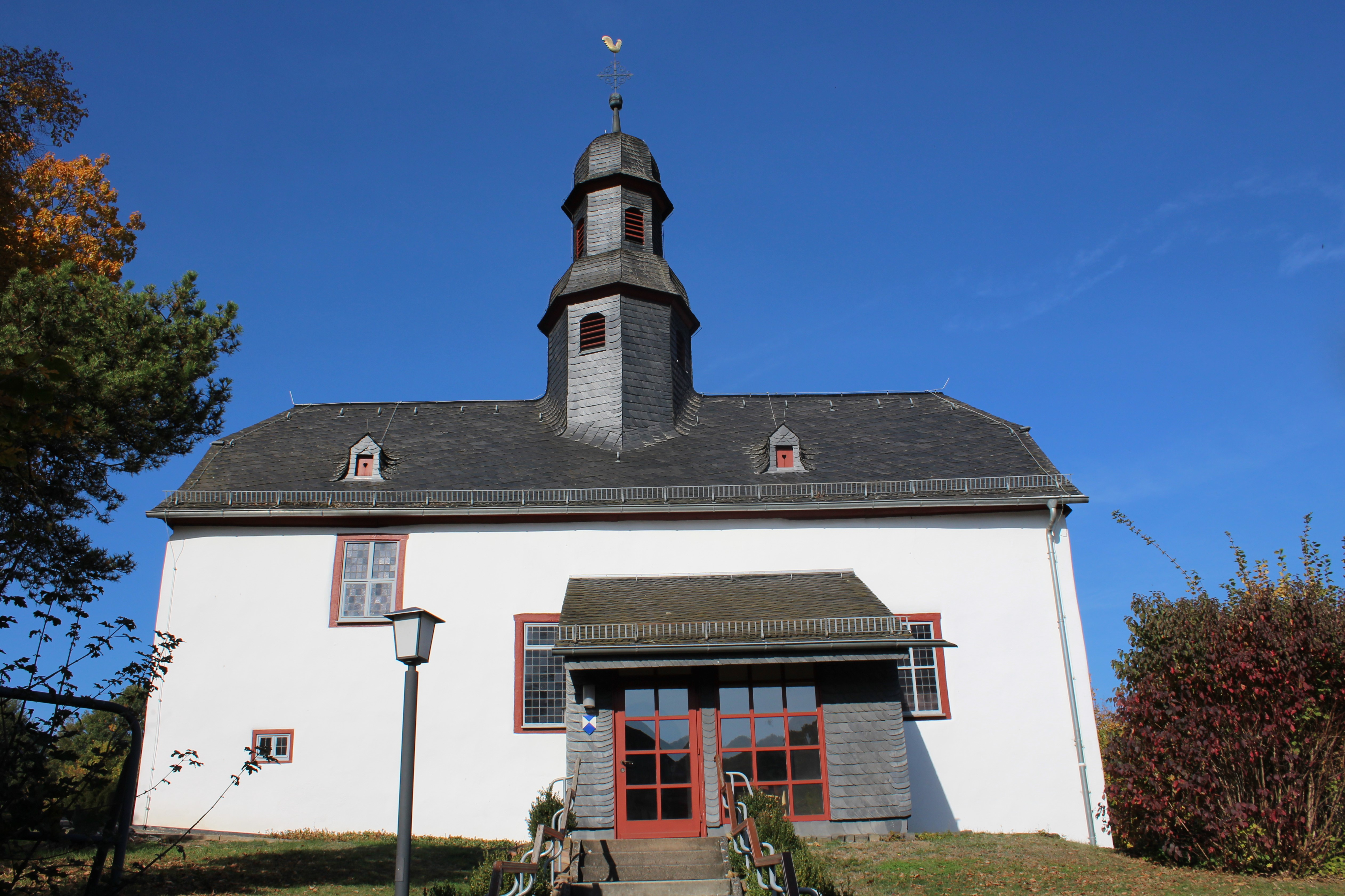 Evangelische Kirche Blasbach, Wetzlar, Lahn-Dill-Kreis, Hessen, Deutschland